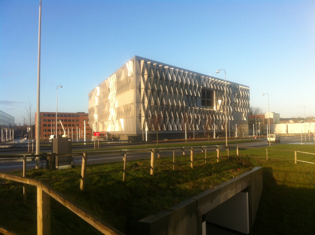 Syddansk Universitets afdeling eller campus i Kolding, foto fra januar 2015